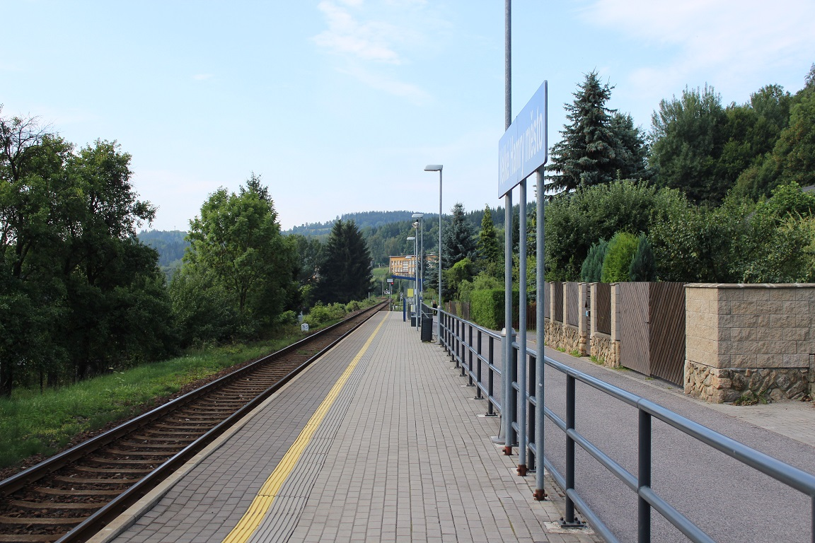 Železniční zastávka Velké Hamry město